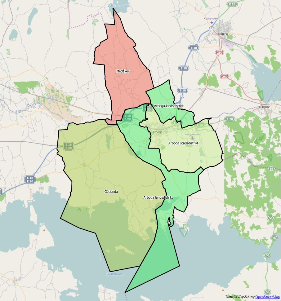 Distriktsindelningen i Arboga kommun